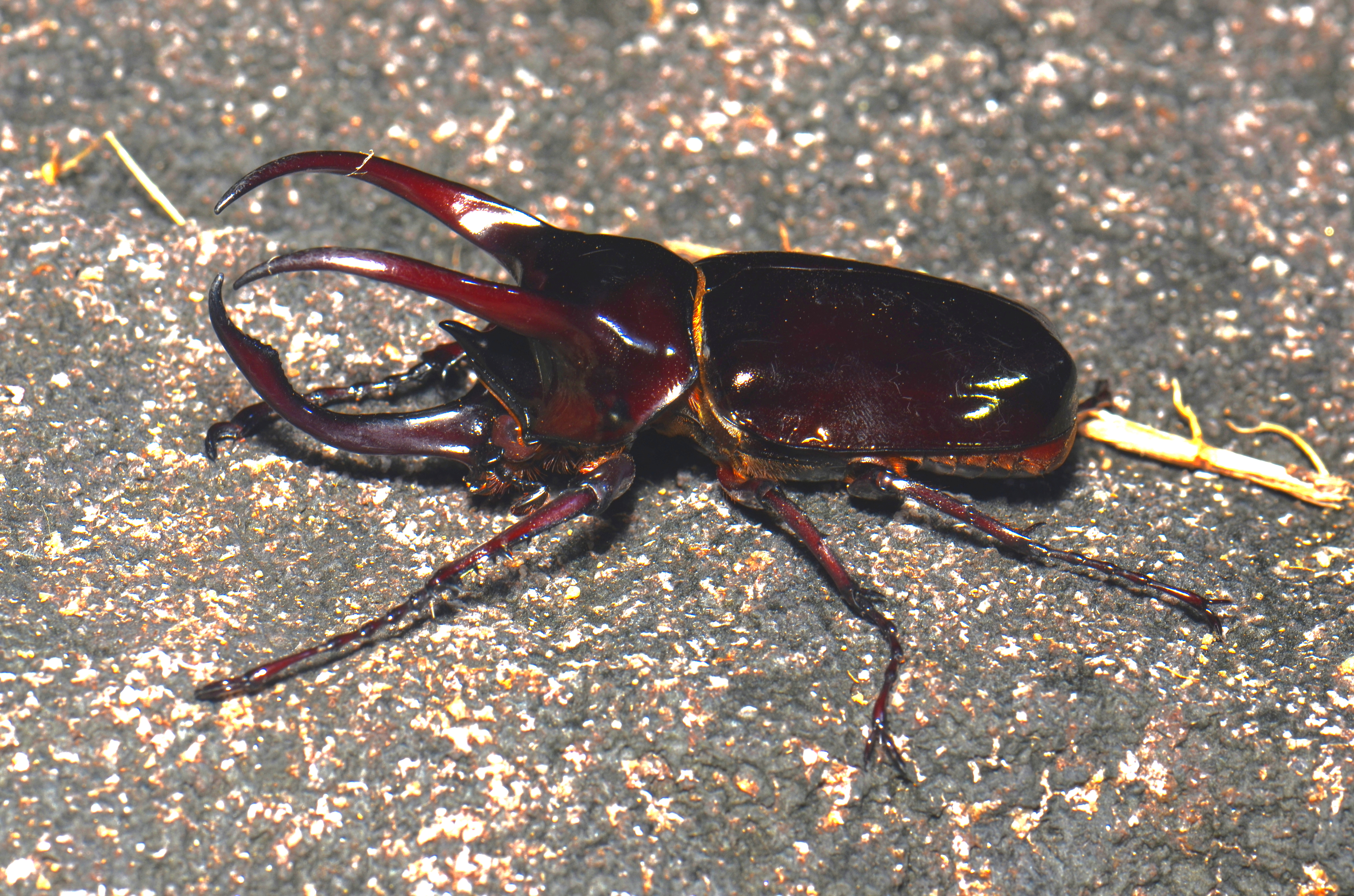 The Moellenkampi beetle (Chalcosoma moellenkampi)